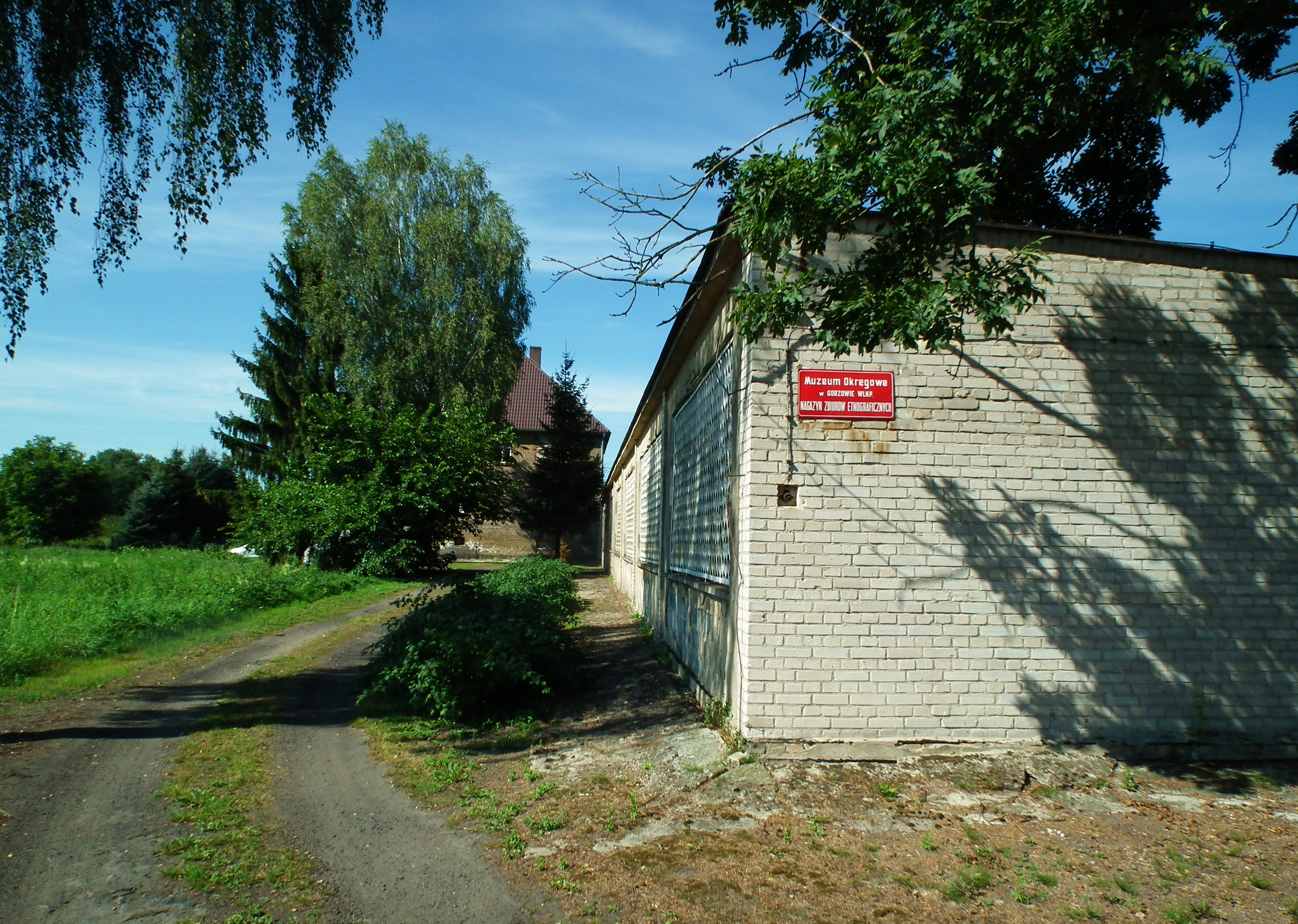 Krzyszcynka w gm. Bogdaniec. Magazyn Muzeum Etnograficznego w Gorzowie. Dawna szkoła.